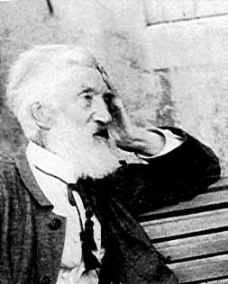 Foto do biografado.